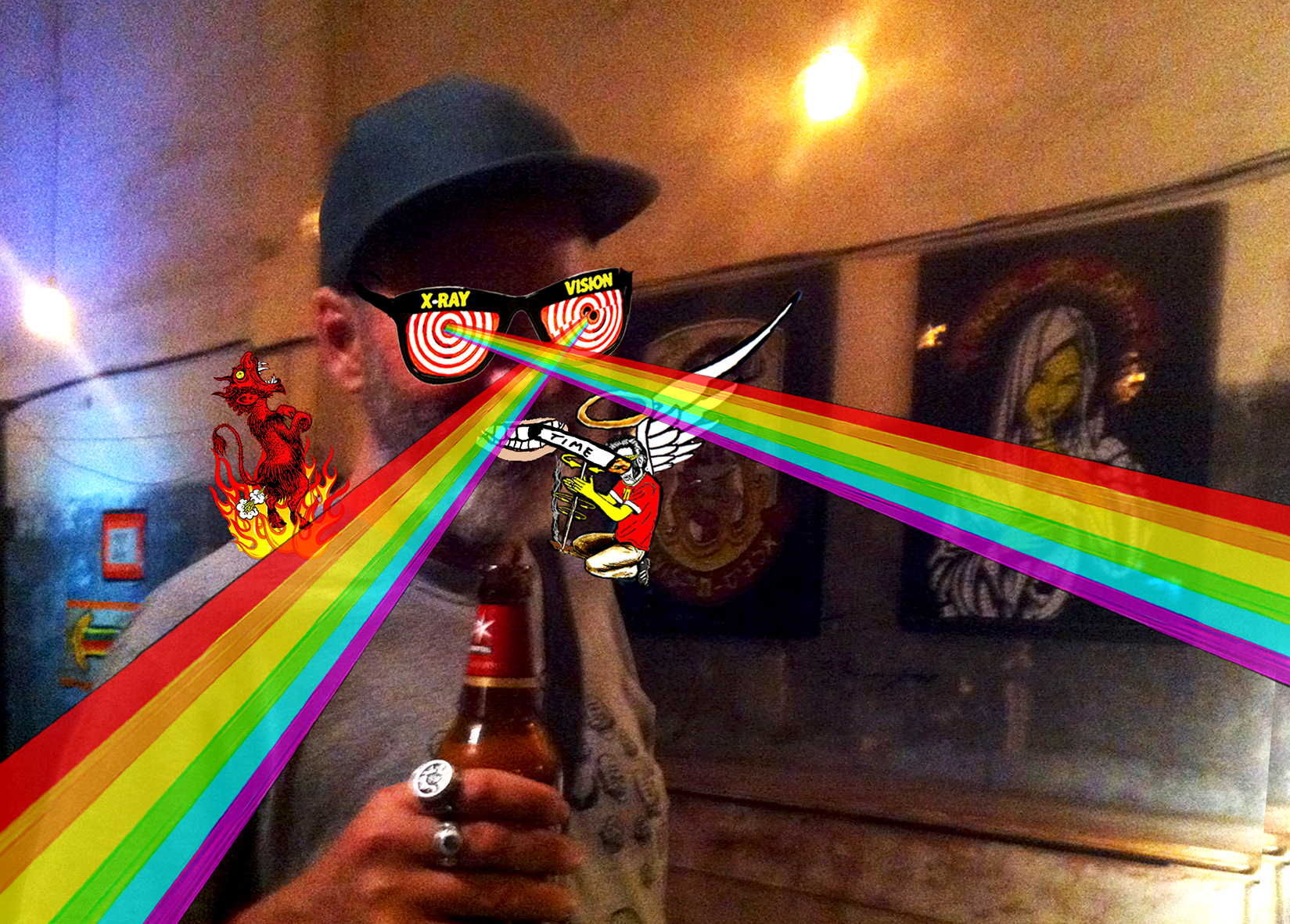 באנגסקי בקרטל חיפה,ראש השנה 2014 צילום סיוון רווה